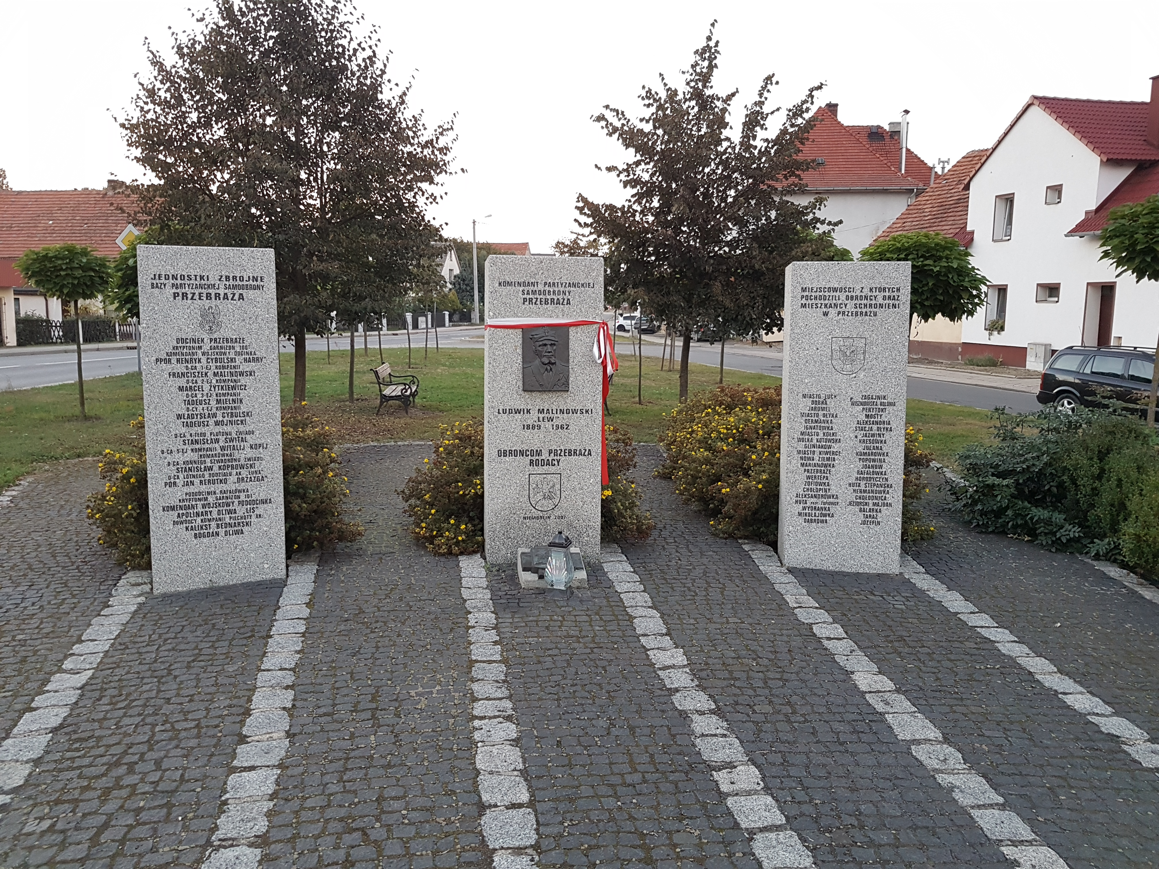 Pomnik komendanta partyzanckiej samoobrony Przebraża na Wołyniu Ludwika Malinowskiego. Obiekt znajduje się w Niemodlinie na placu Obrońców Przebraża.